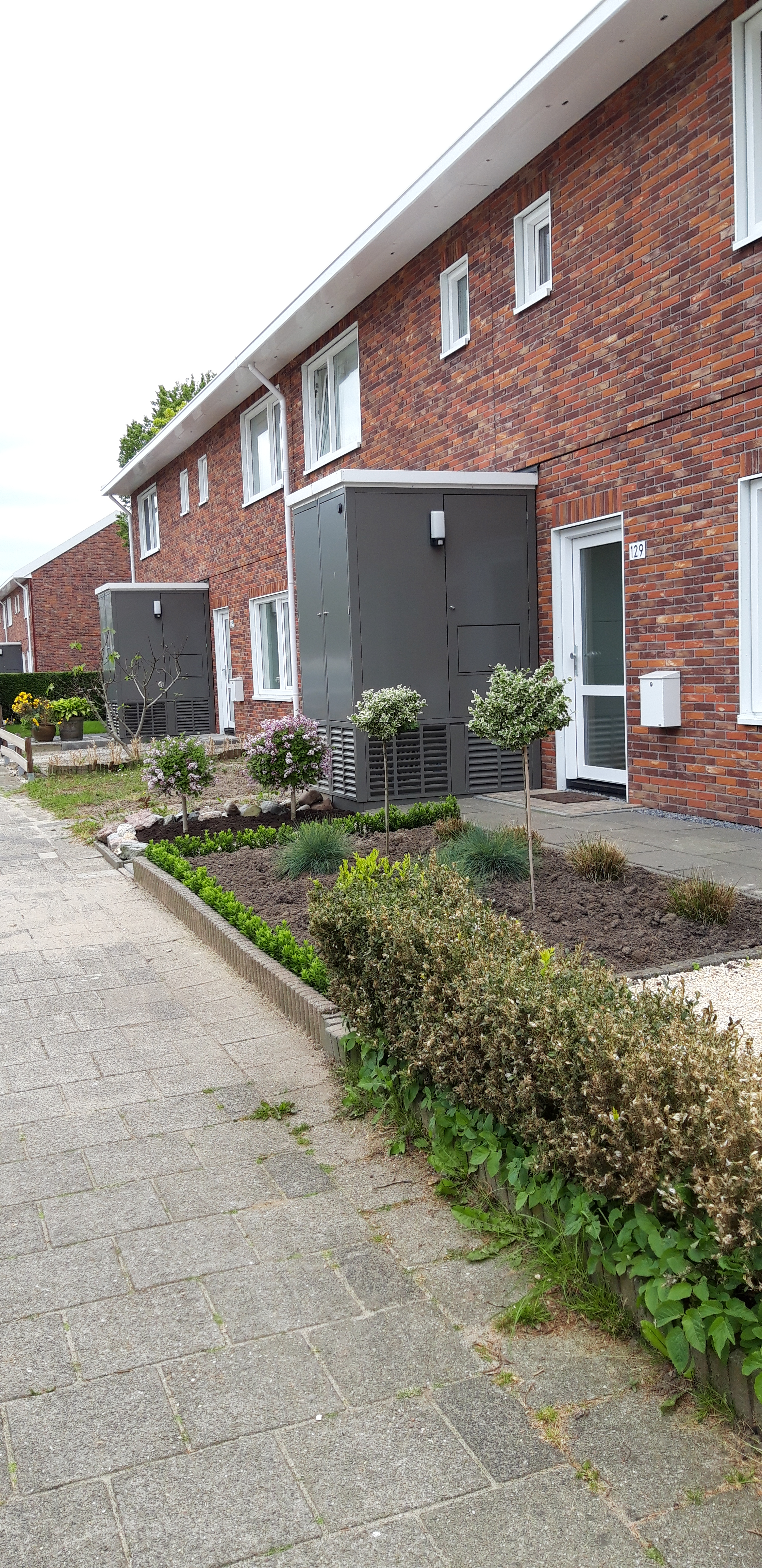 Warmtepompen bij huurwoningen in Schilderskwartier Woerden. Jan Steenstraat